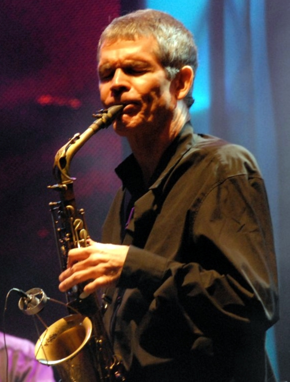 David Sanborn, Festival de Jazz Riviera Maya 2008